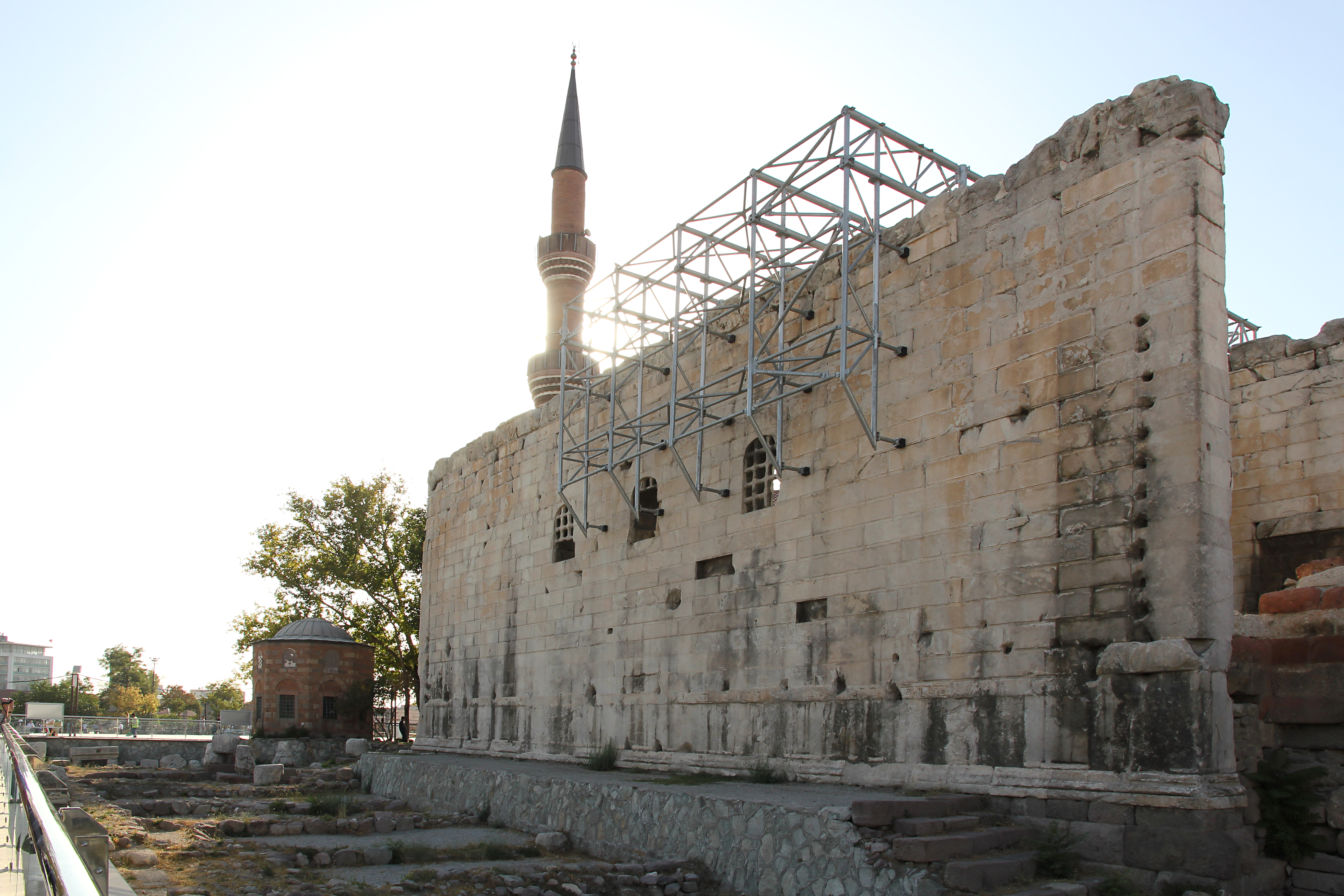 Tempel der Roma und des Augustus, Ankara, Türkei, Außenwand (Südosten) mit griechischer Version der Res gestae divi Augusti, Ansicht von Osten